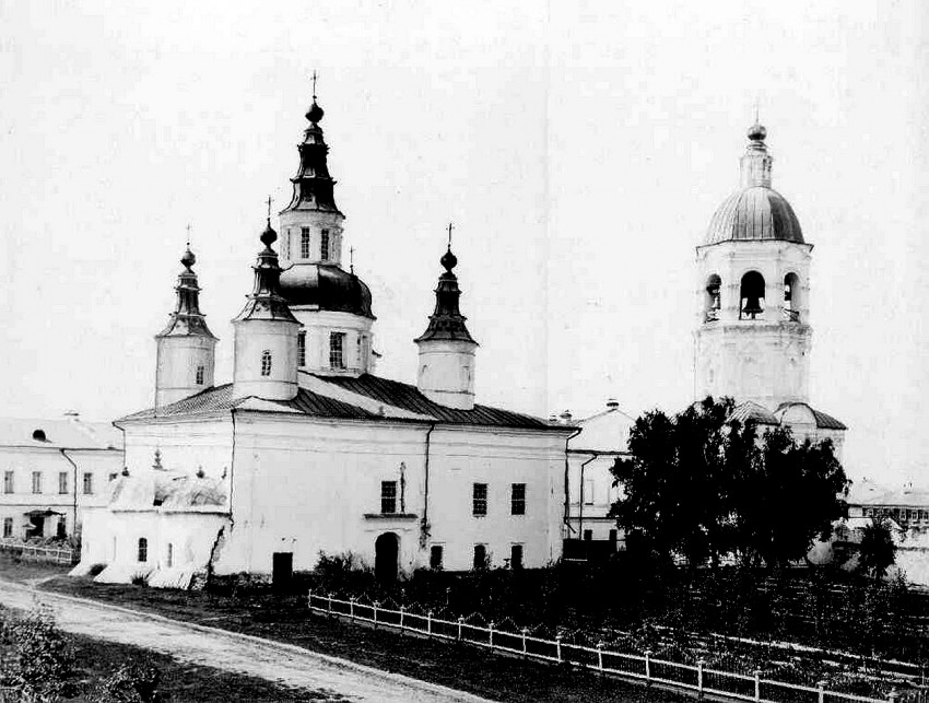 Znamensky_Monastery_in_Tobolsk